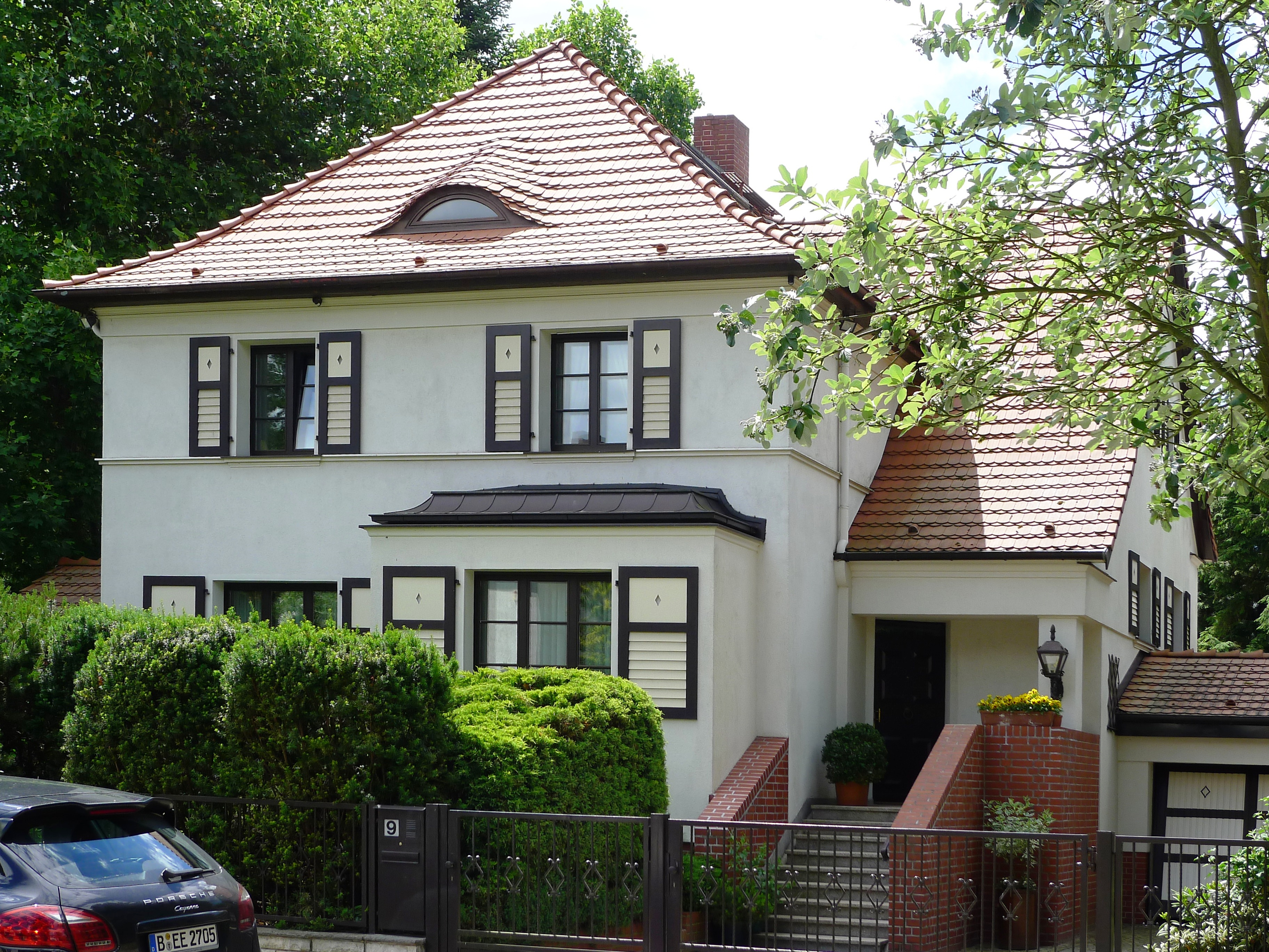 Wohnhaus